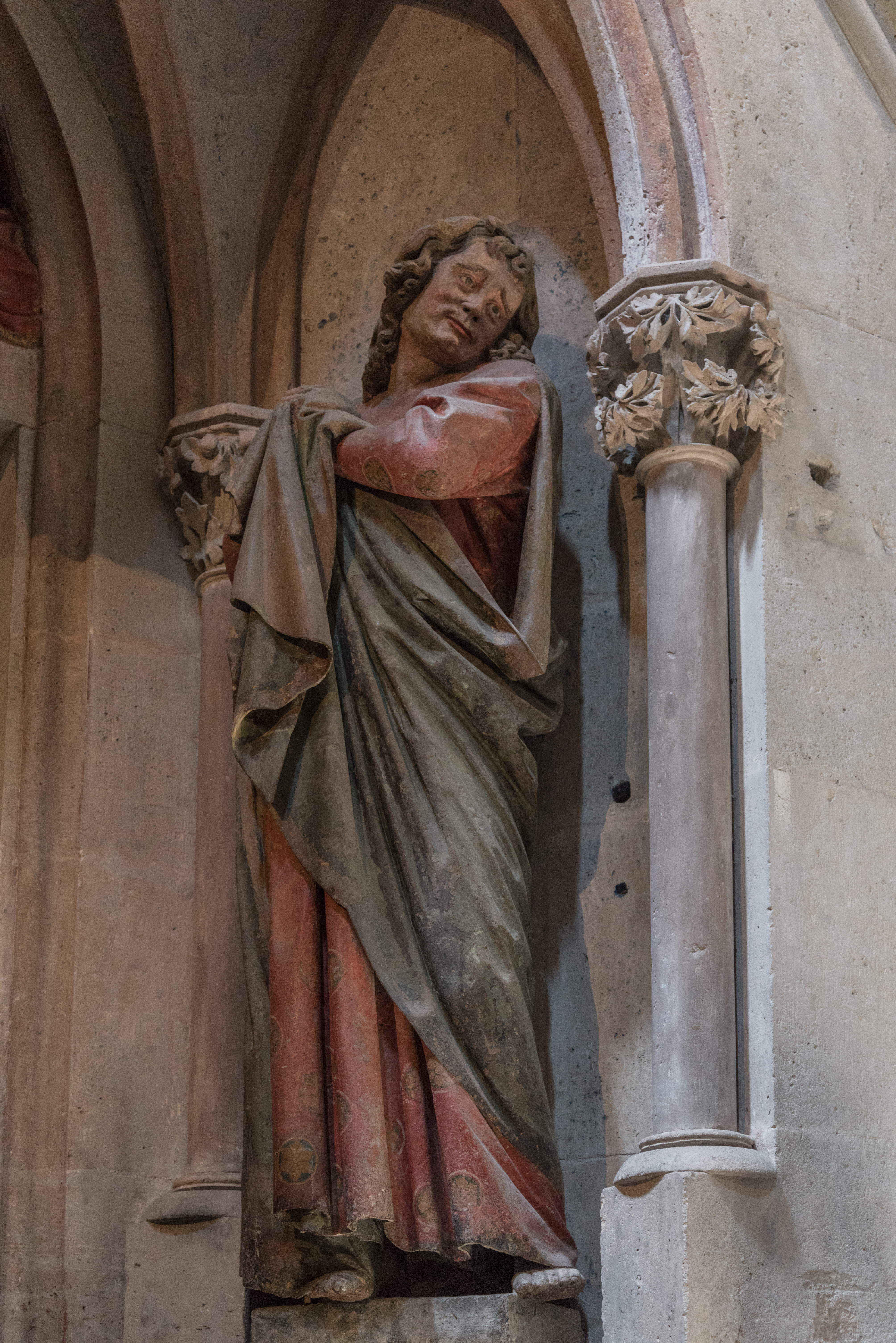 Naumburg an der Saale, Dom, Westlettner